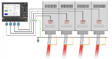 Подключение системы HVPD Longshot для диагностики (методом измерения частичных разрядов) кабельных линий, трансформаторов, разрядников, емкостей, двигателей и генераторов напряжением до 750 кВ.